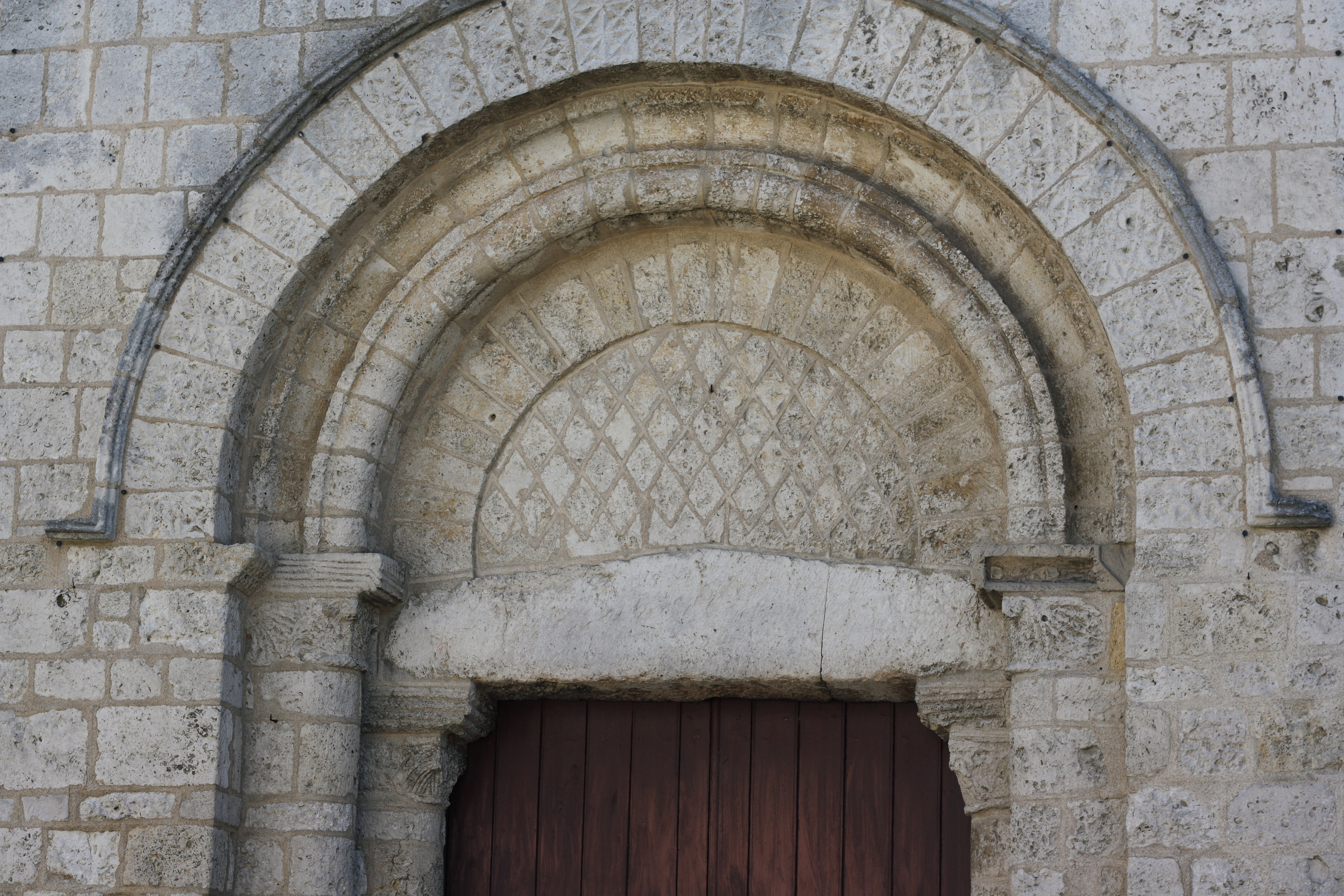 Katholische Kirche Notre-Dame de l'Assomption in Château-Landon, einer Gemeinde im Département Seine-et-Marne (Île-de-France), romanisches Portal